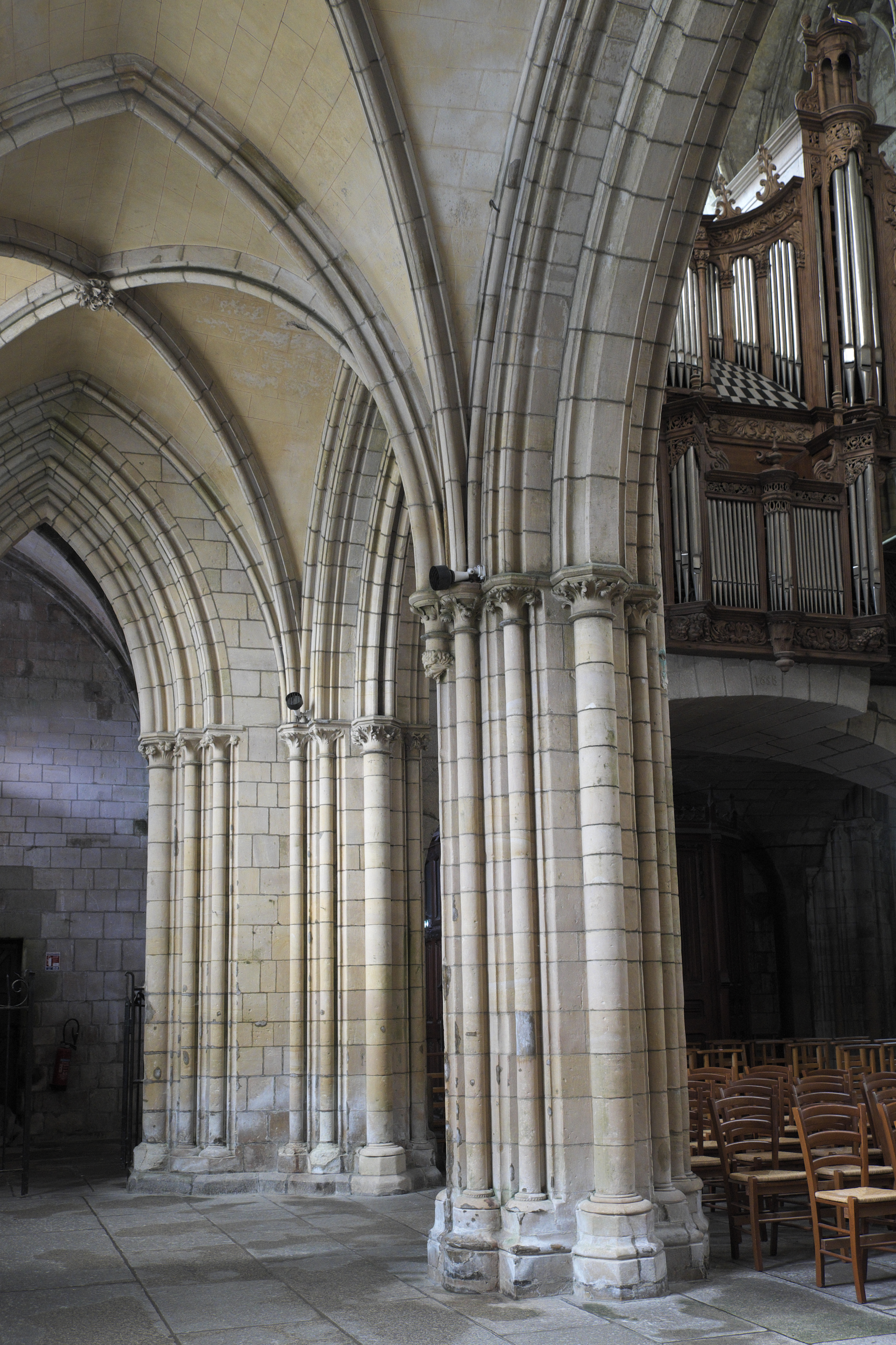 Ehemalige Kathedrale Saint-Paul-Aurélien in Saint-Pol-de-Léon im Département Finistère (Region Bretagne/Frankreich), Innenraum